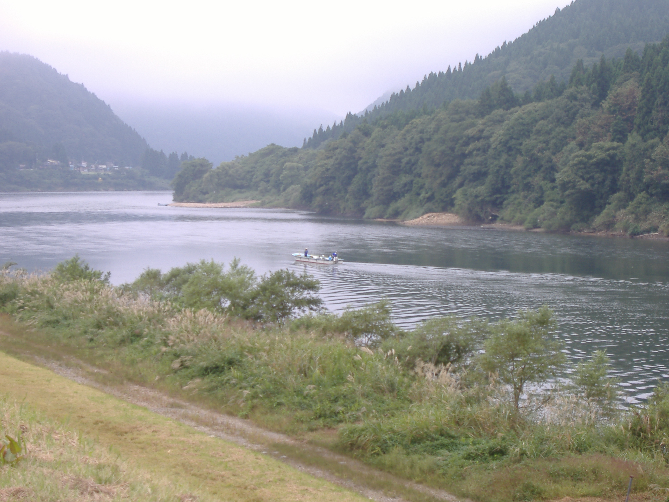 Vue de fleuve Mogami depuis le village de Tozawa.